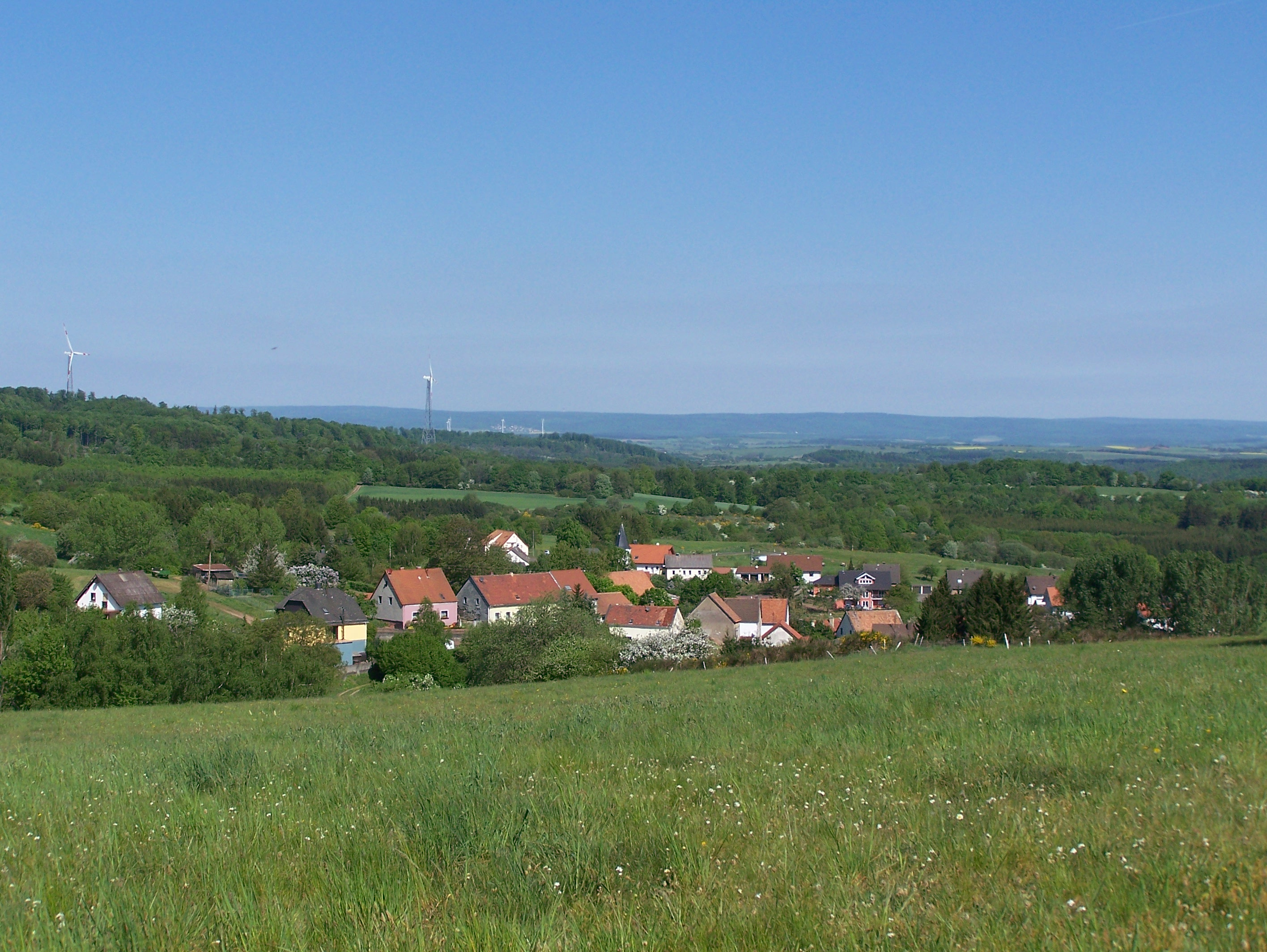 Blick auf Eckersweiler